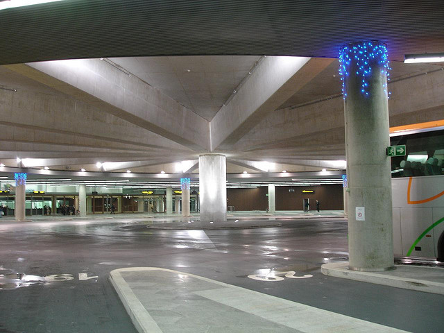 Dársenas